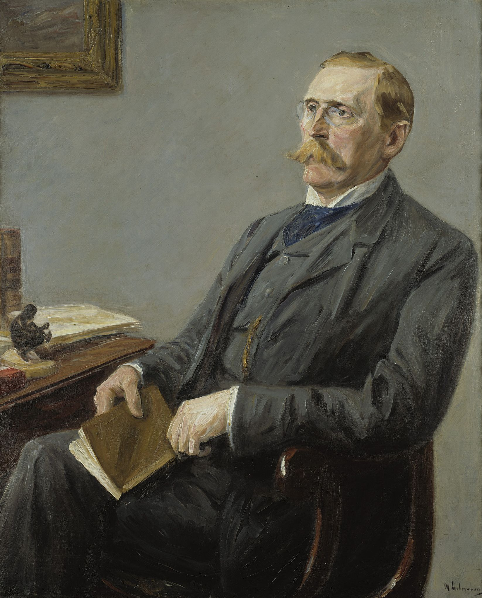 Depicted person: Wilhelm von Bode